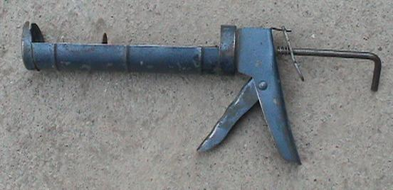 Skelettpistole